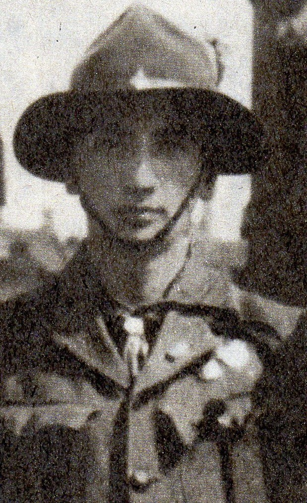 Józef Kwietniewski - harcerz i polityk.